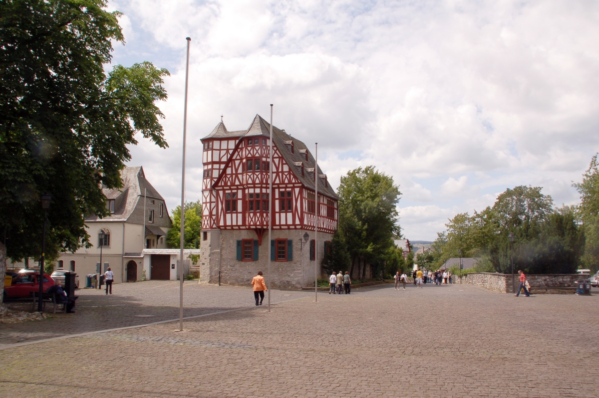 Domplatz, Limburg an der Lahn, Hessen, Deutschland